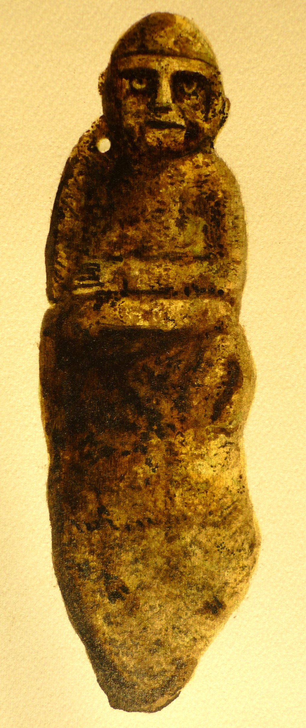 Estatua monolítica de la cultura muisca o chibcha, del altiplano cundiboyacense (Colombia). Encontrada en Mongua. Boyacá. Dibujo a tintas de Fabio Barrera Téllez.